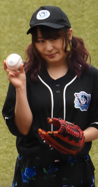 櫻川めぐです。